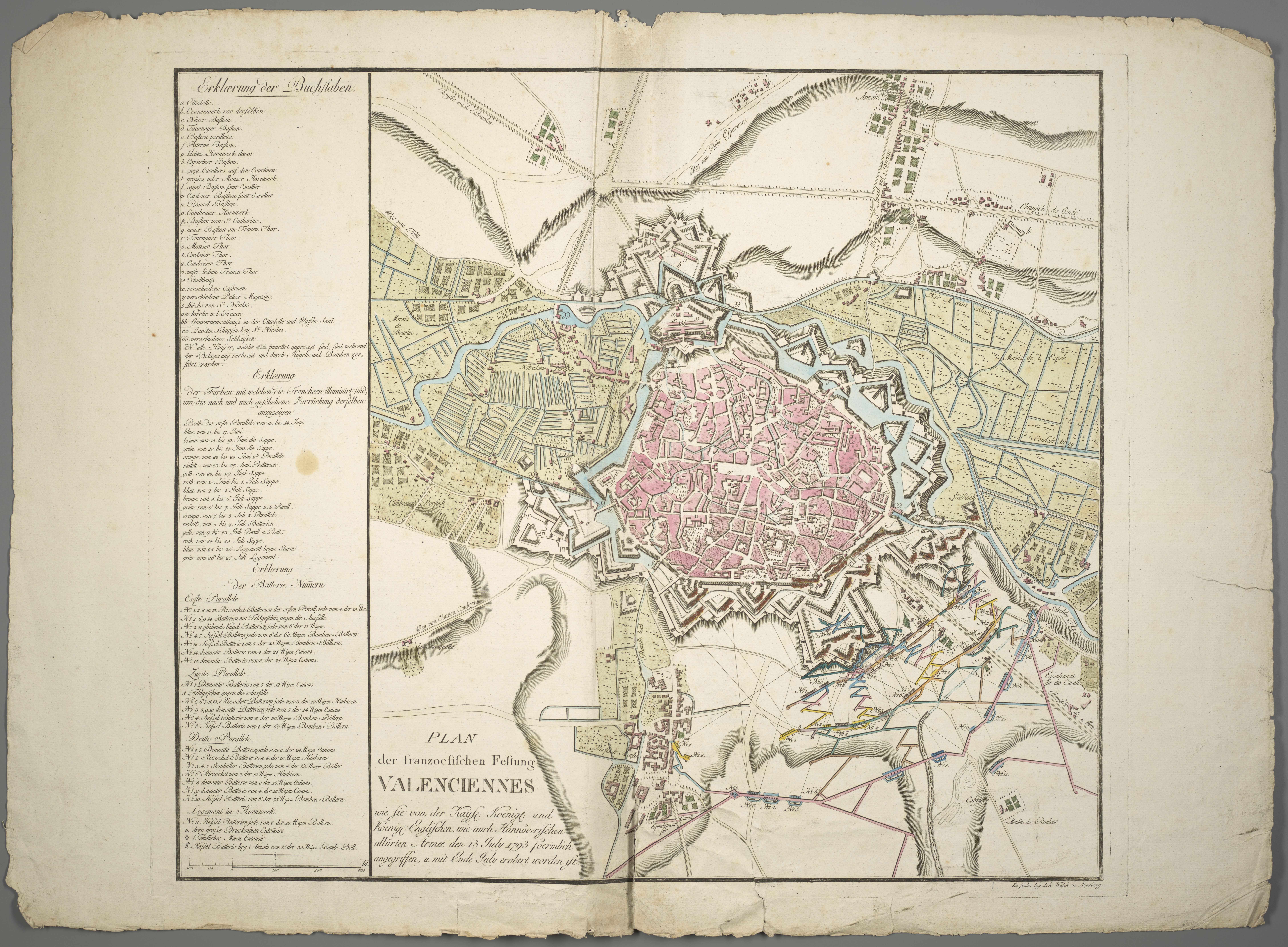 1 Kt. : kolor. (55 x 48 cm) ; Koordinaten E 3°30'04"-E 3°33'14"/N 50°22'33"-N 50°20'31" ; Maßstab in graph. Form (Kl[after]). - Titel und Maßstab unten links. - Mit Truppenstellungen. - Mit Legende links. - Ohne Kt.-Netz. - W oben. - Relief: Schraffen